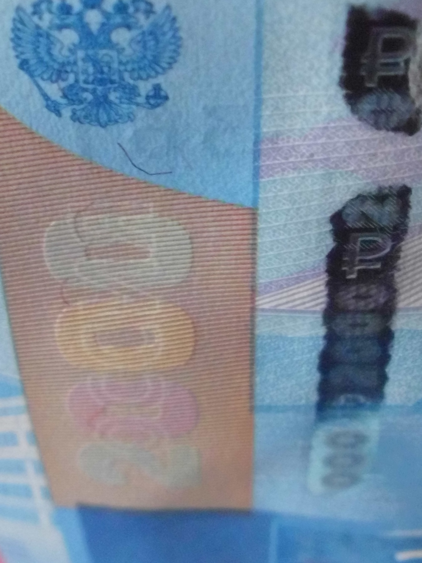 2000 российских рублей образца 2017 года. Аверс. Цветопеременное число 2000, контурная надпись "РОССИЯ" на заштрихованном флюоресцирующем поле с левой стороны банкноты. Вид с верхней стороны банкноты.